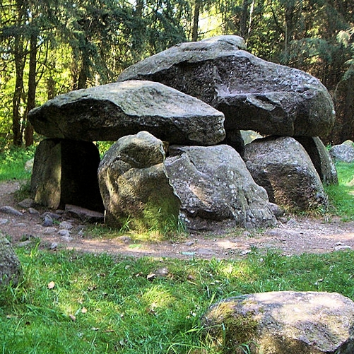 der Teufelsbackofen in der Südgruppe der Großsteingräber im Everstorfer Forst bei Grevesmühlen